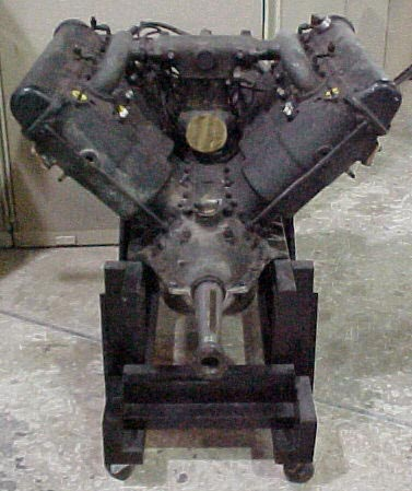 Motor de aviación Hispano-Suiza de 140CV de 1914